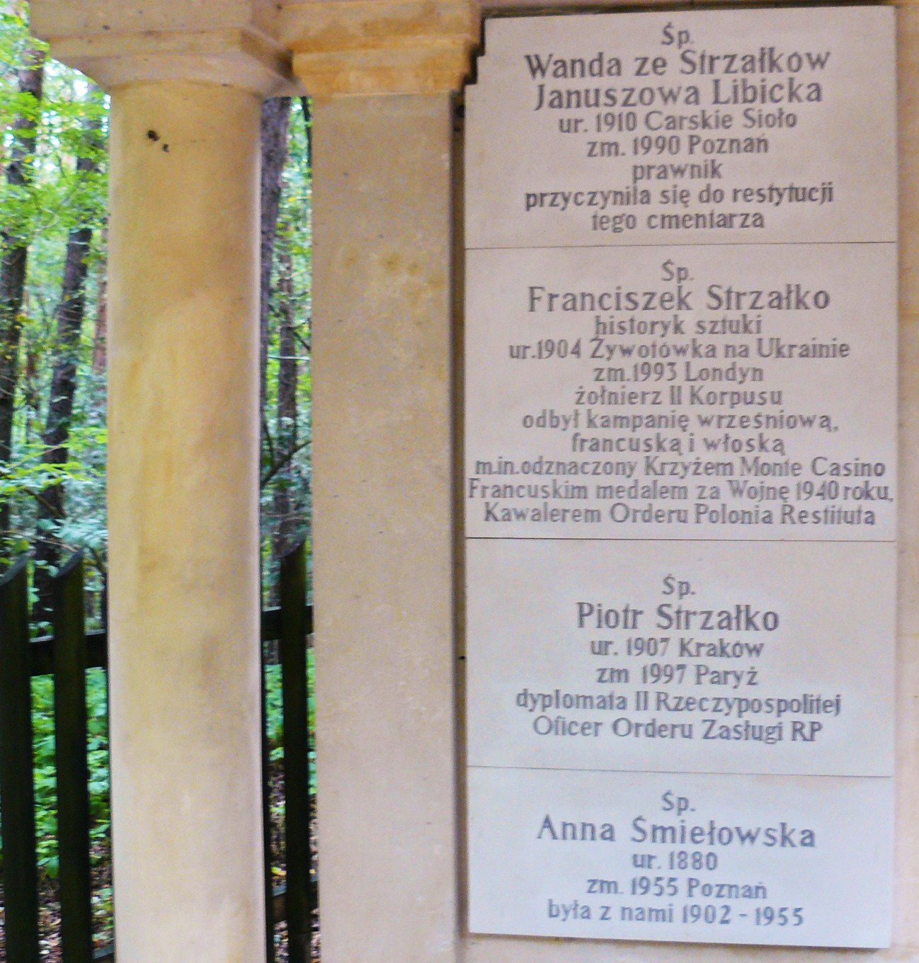 Mauzoleum Strzałków i Libickich, Radzewice koło Mosiny